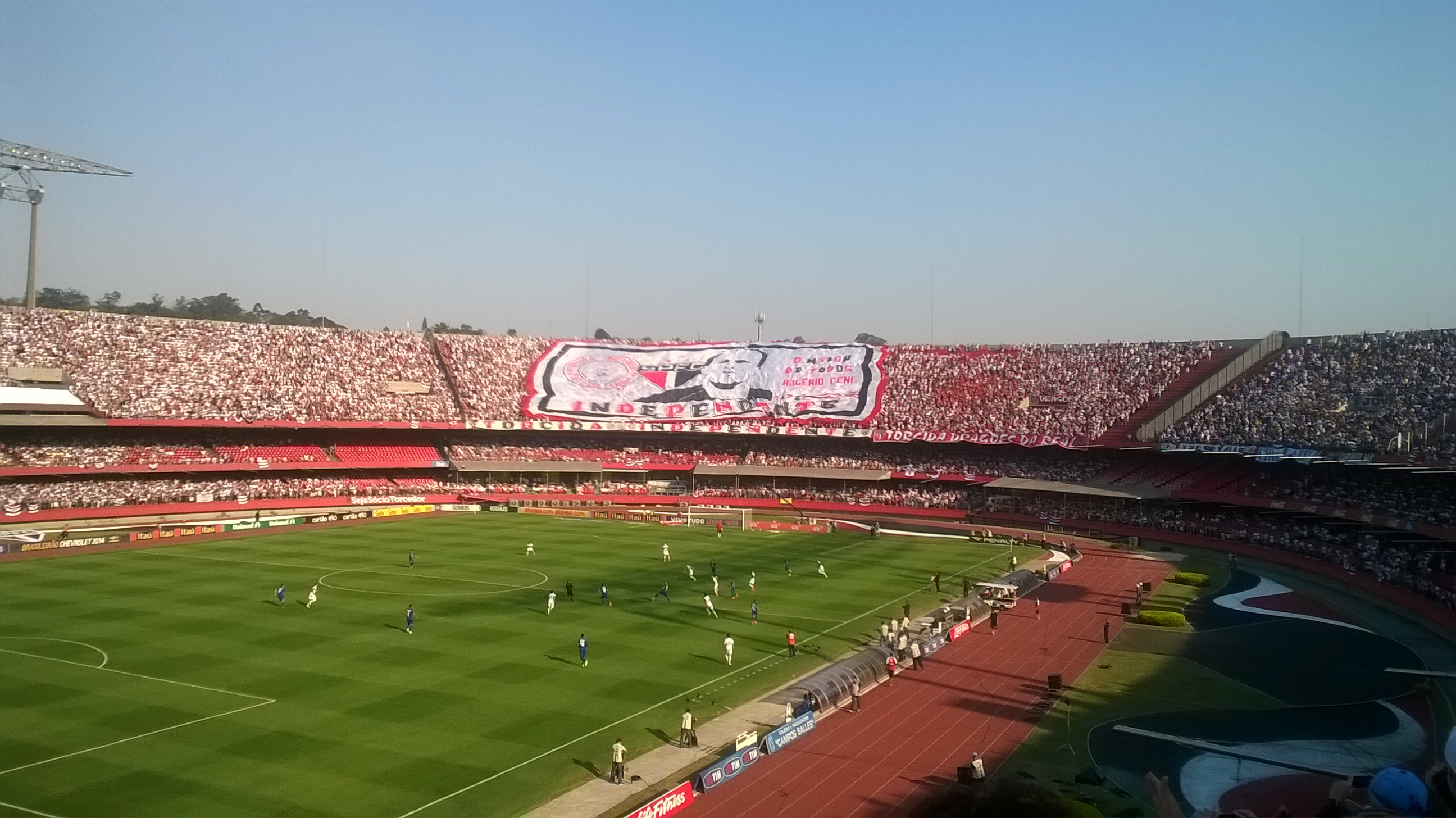 Bandeira da torcida Independente no Morumbi, 2014